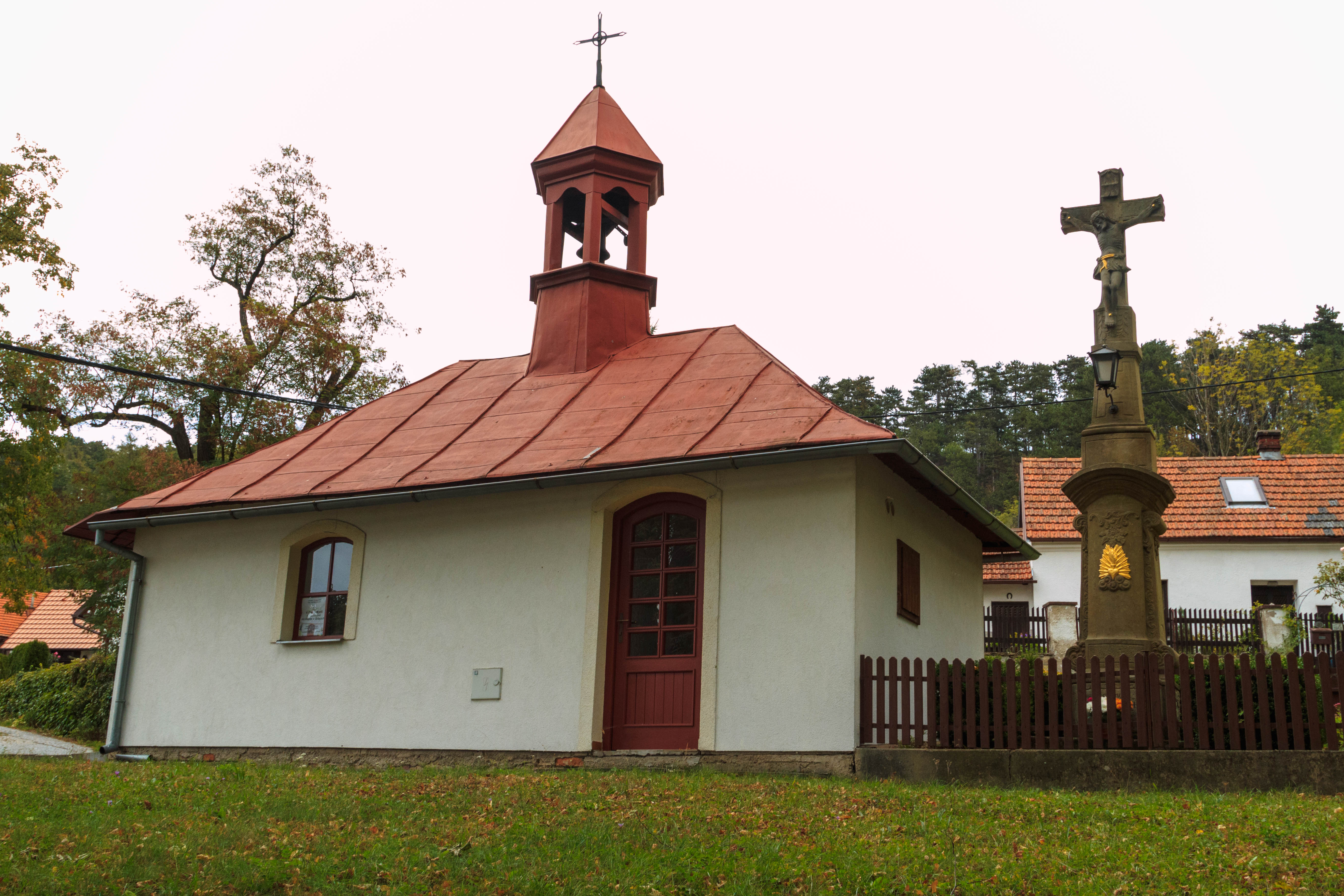 Srbce kaple